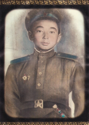 Iskakov Dzhures